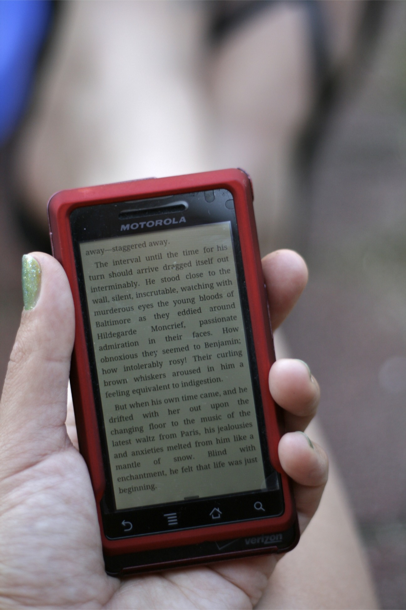 F. Scott Fitzgerald